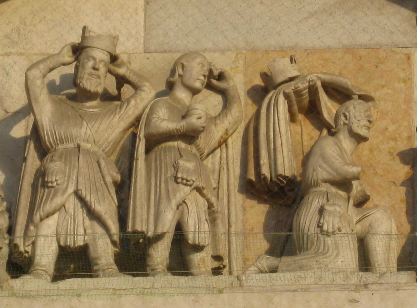 Perkele, l'Adorazione dei Magi nella lunetta dell'Abbazia di San Mercuriale